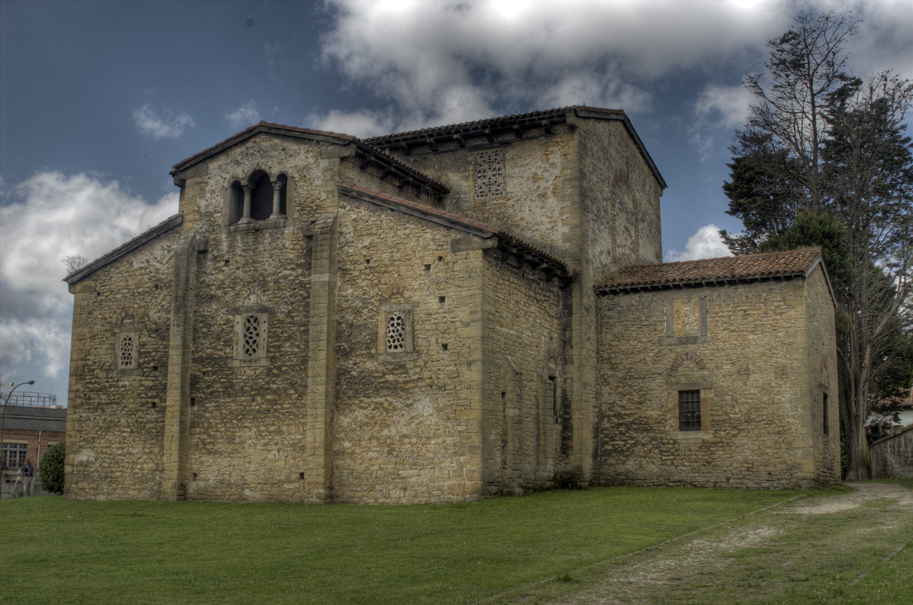 San Julián de los Prados